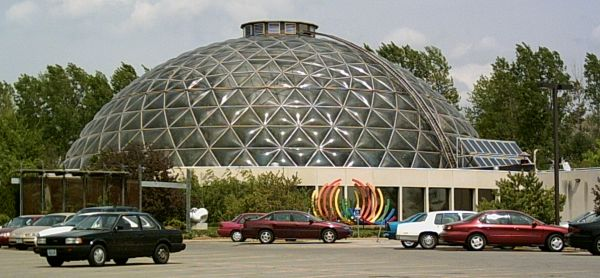 Des Moines Botanical Center